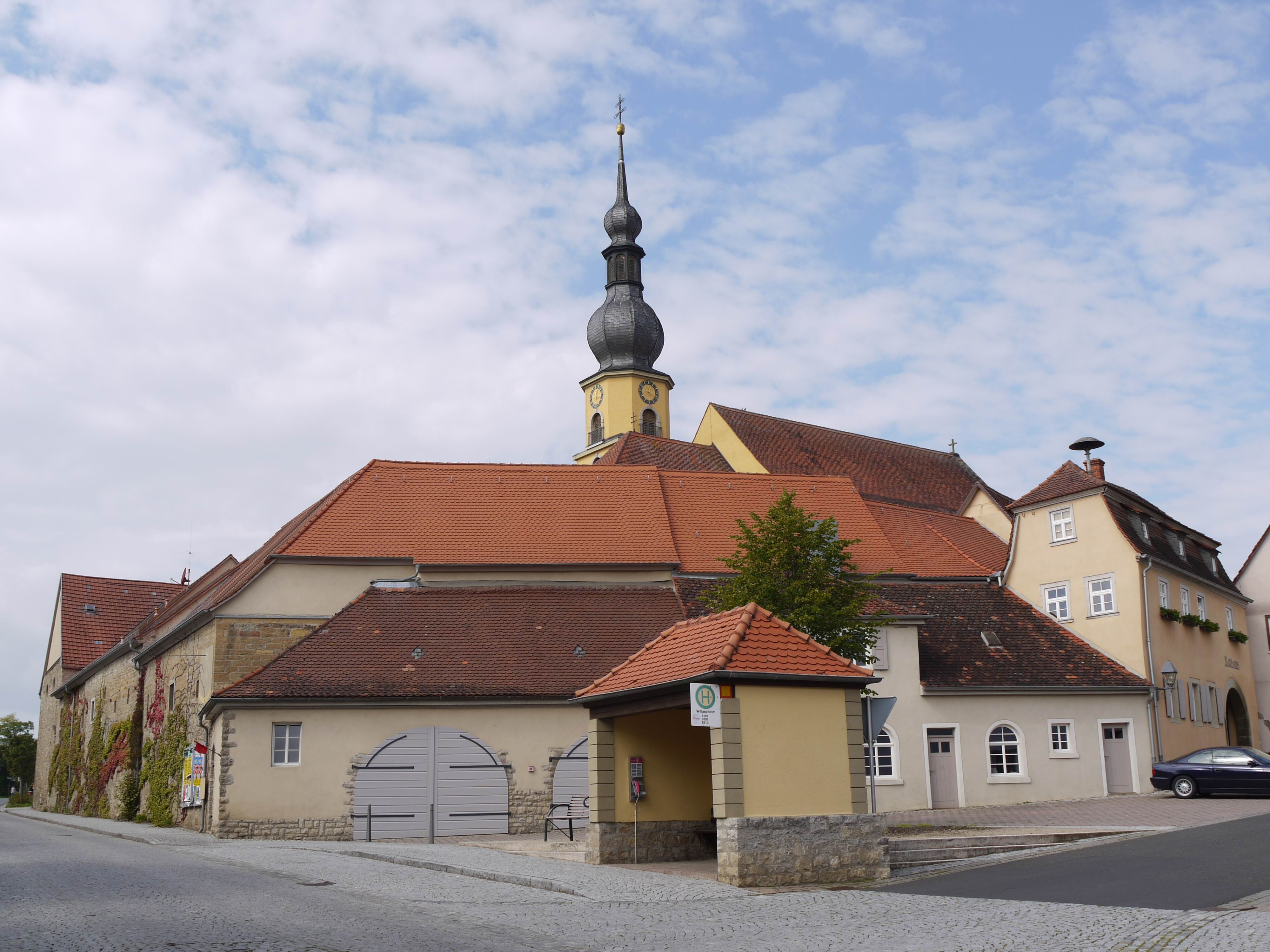 Kirchenburg in Willanzheim, Unterfranken